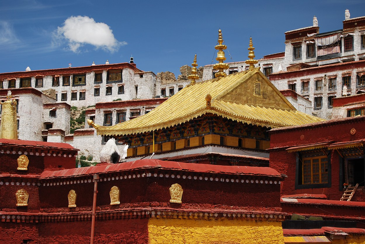 Kloster Ganden Tibet